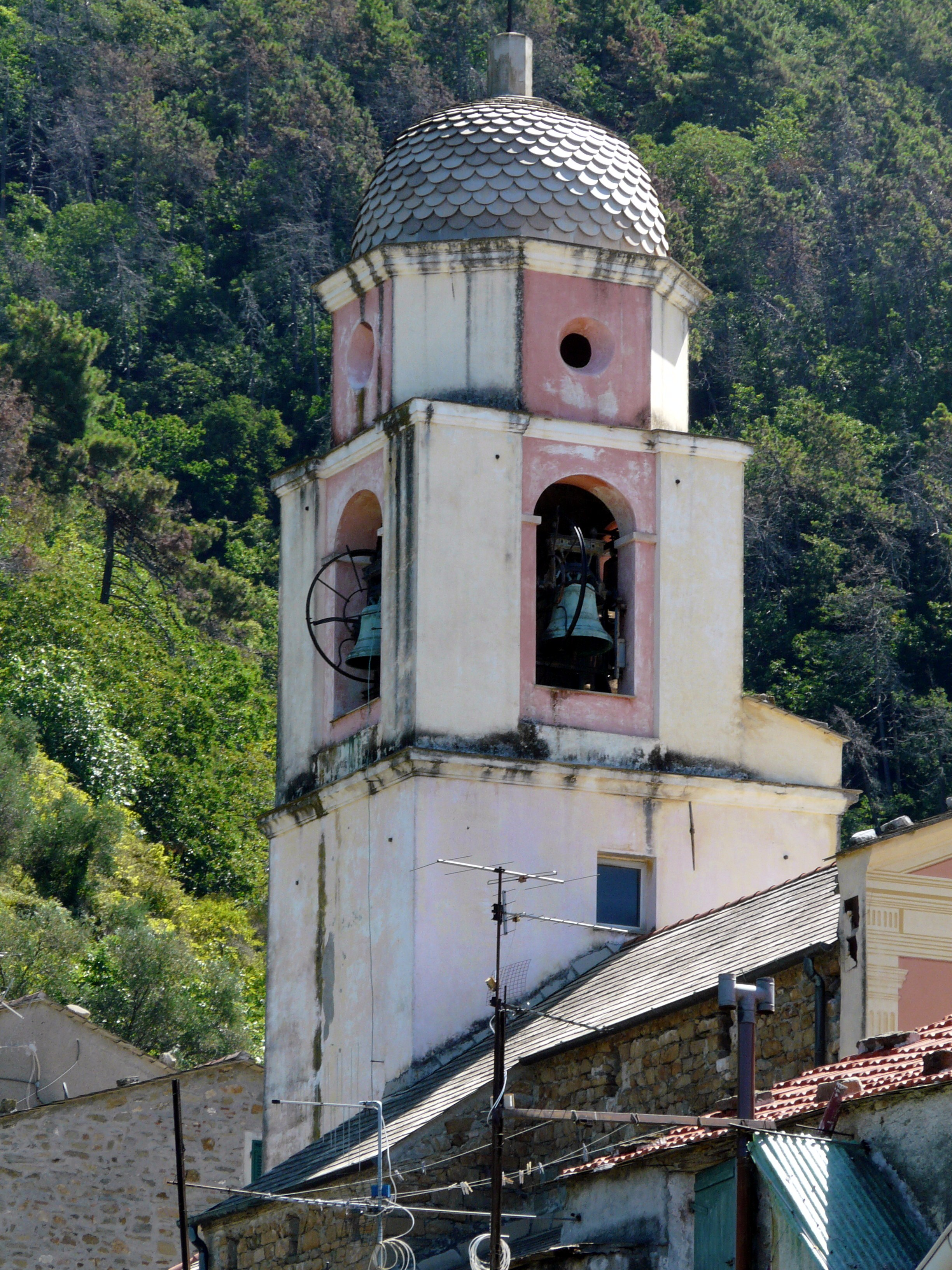 Il campanile della chiesa di San Nicolò, Chiesa Nuova, Levanto, Liguria, Italia